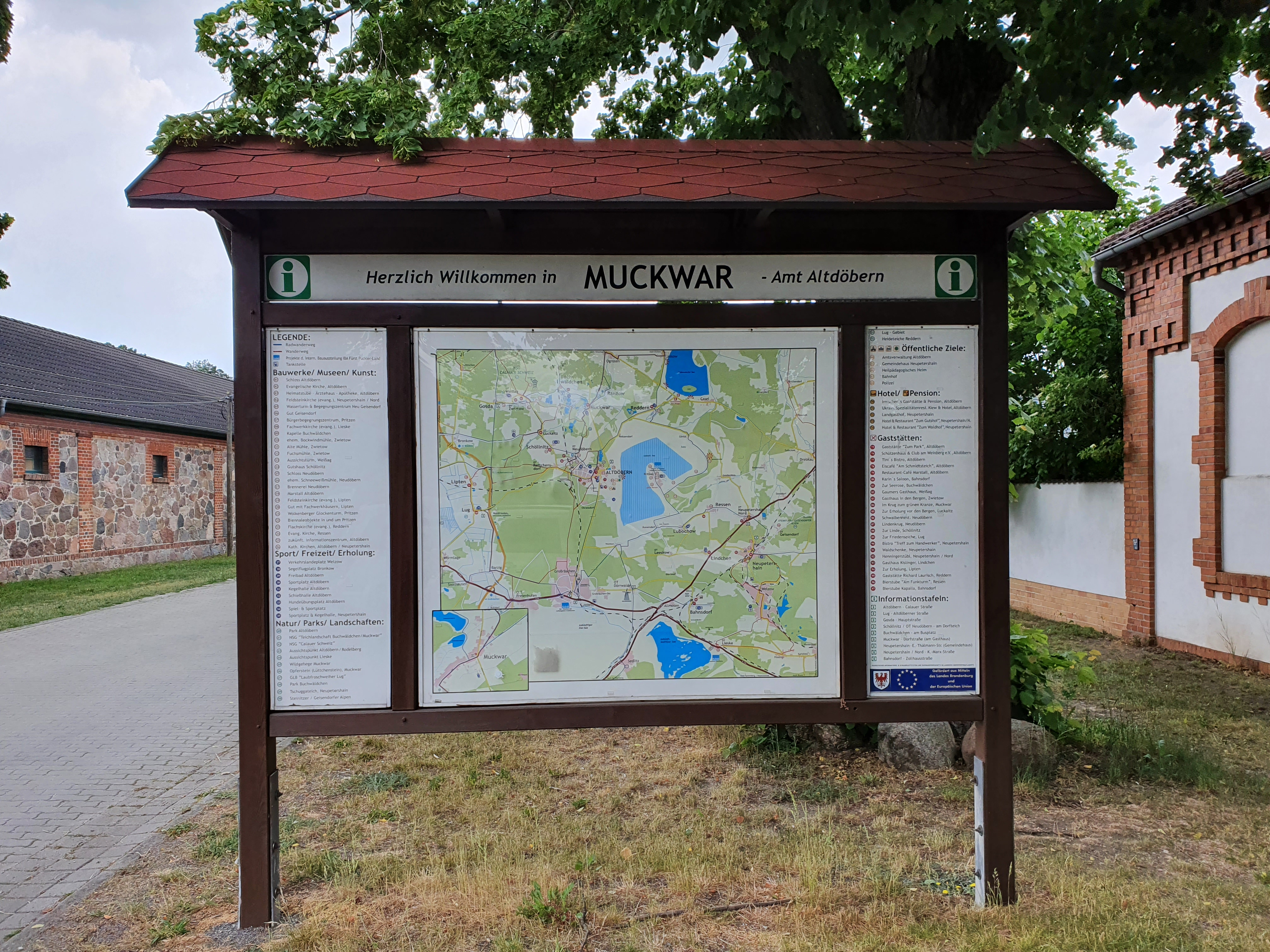 Hinweistafel des Amtes Altdöbern im Ortszentrum von Muckwar (neben dem Dorfkrug).